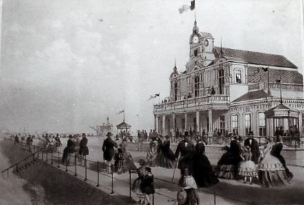 Lithografie door H. Borremans. Productiedatum: 1858